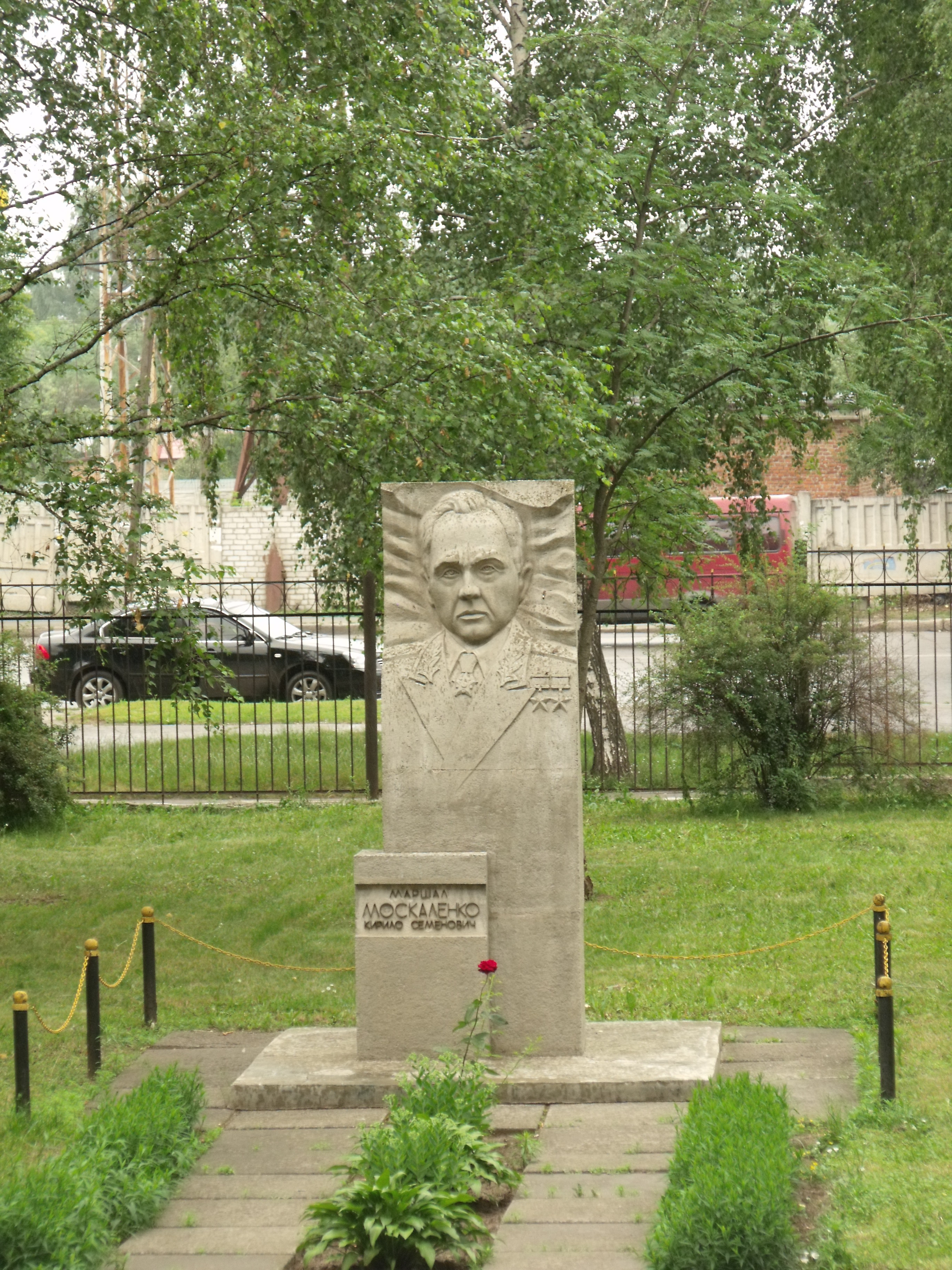 Пам’ятний знак двічі Герою Радянського Союзу, маршалу Радянського Союзу К.С.Москаленку: Полтава, Зіньківська вул., 44 (територія ПВІЗ)